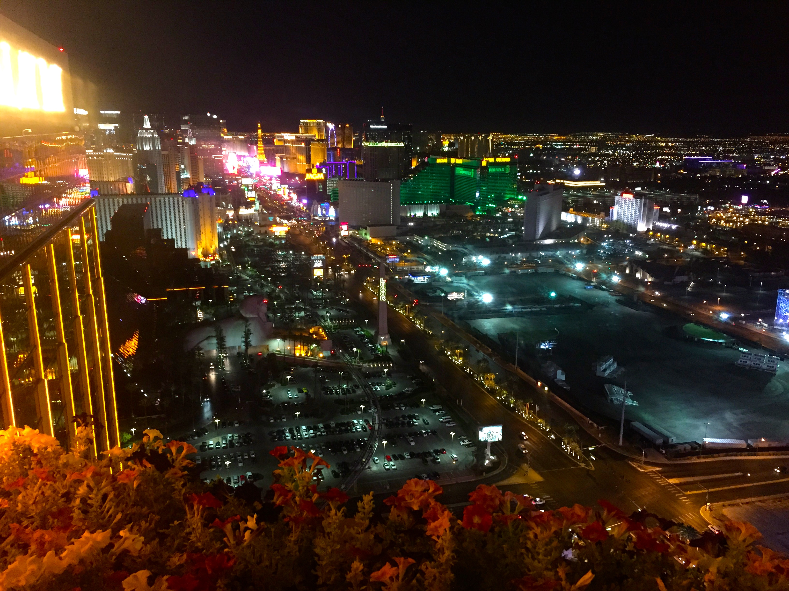 At Mandalay Bay